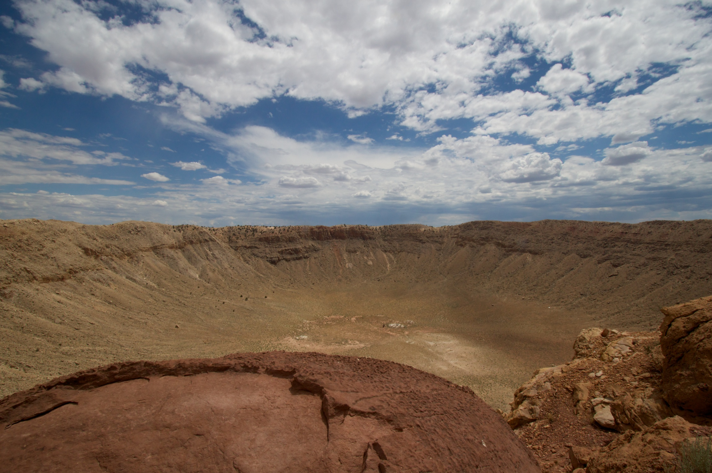 Meteor Crater Under a Big Sky